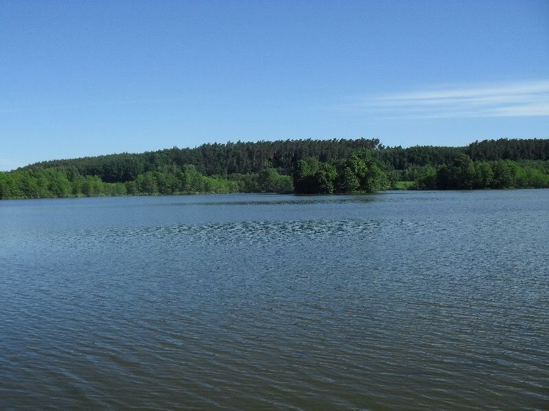 jezioro Zbiczno